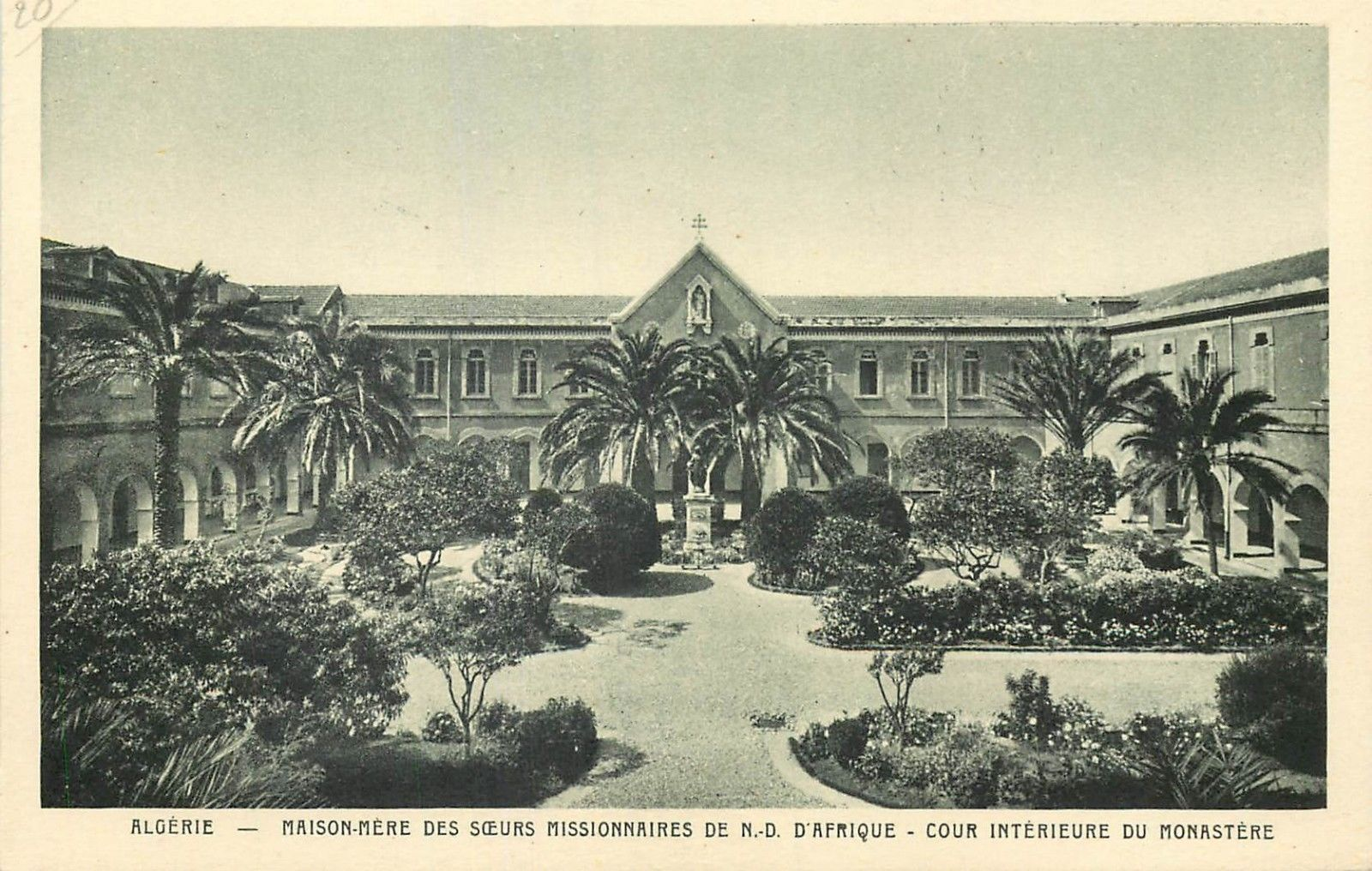 Maison-mère des missionnaires de Notre-Dame d'Afrique en Algérie française.